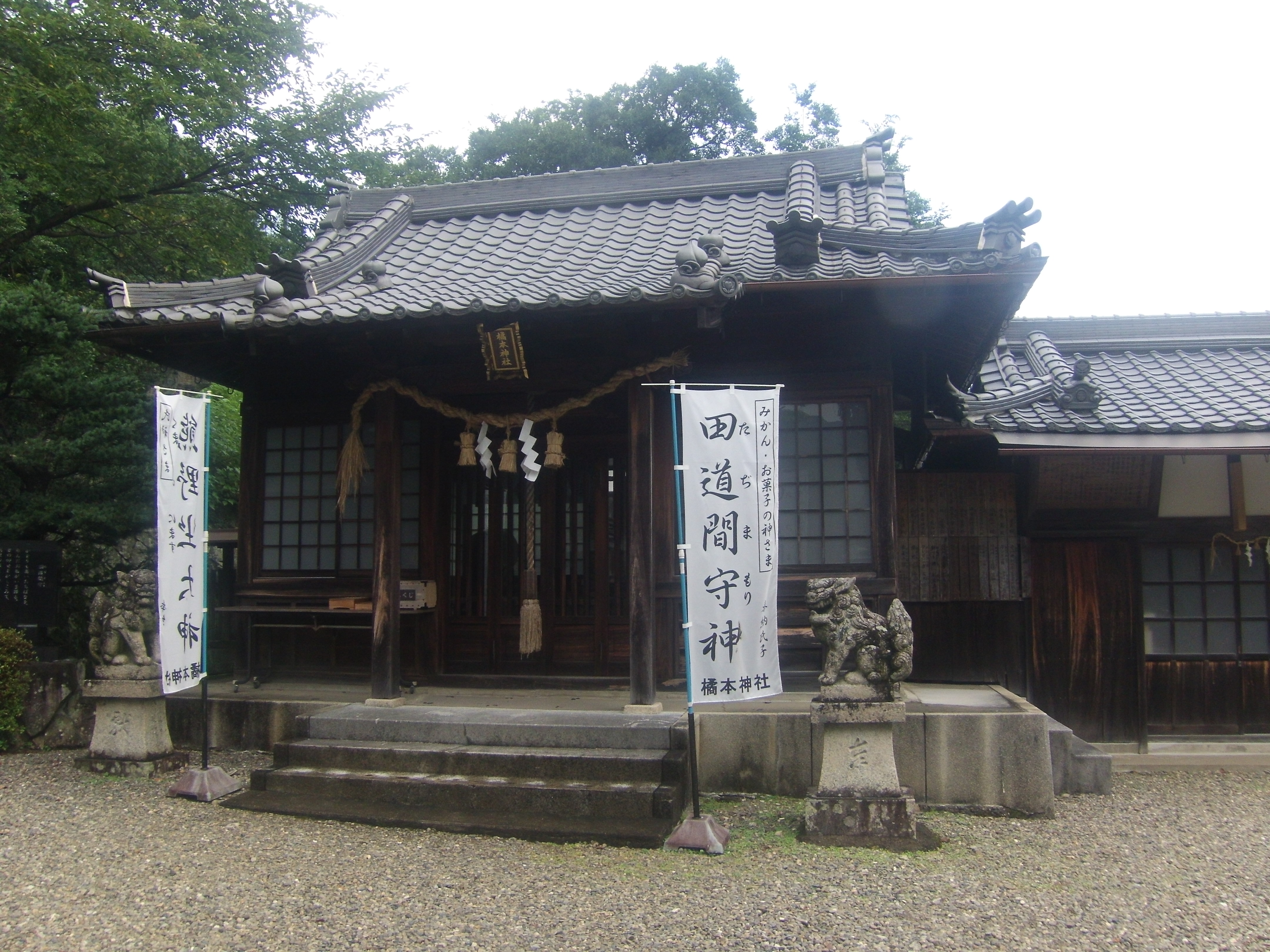 和歌山県海南市の橘本神社社殿